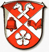 Coat of arms Reeßum, Wappen der Gemeinde Reeßum